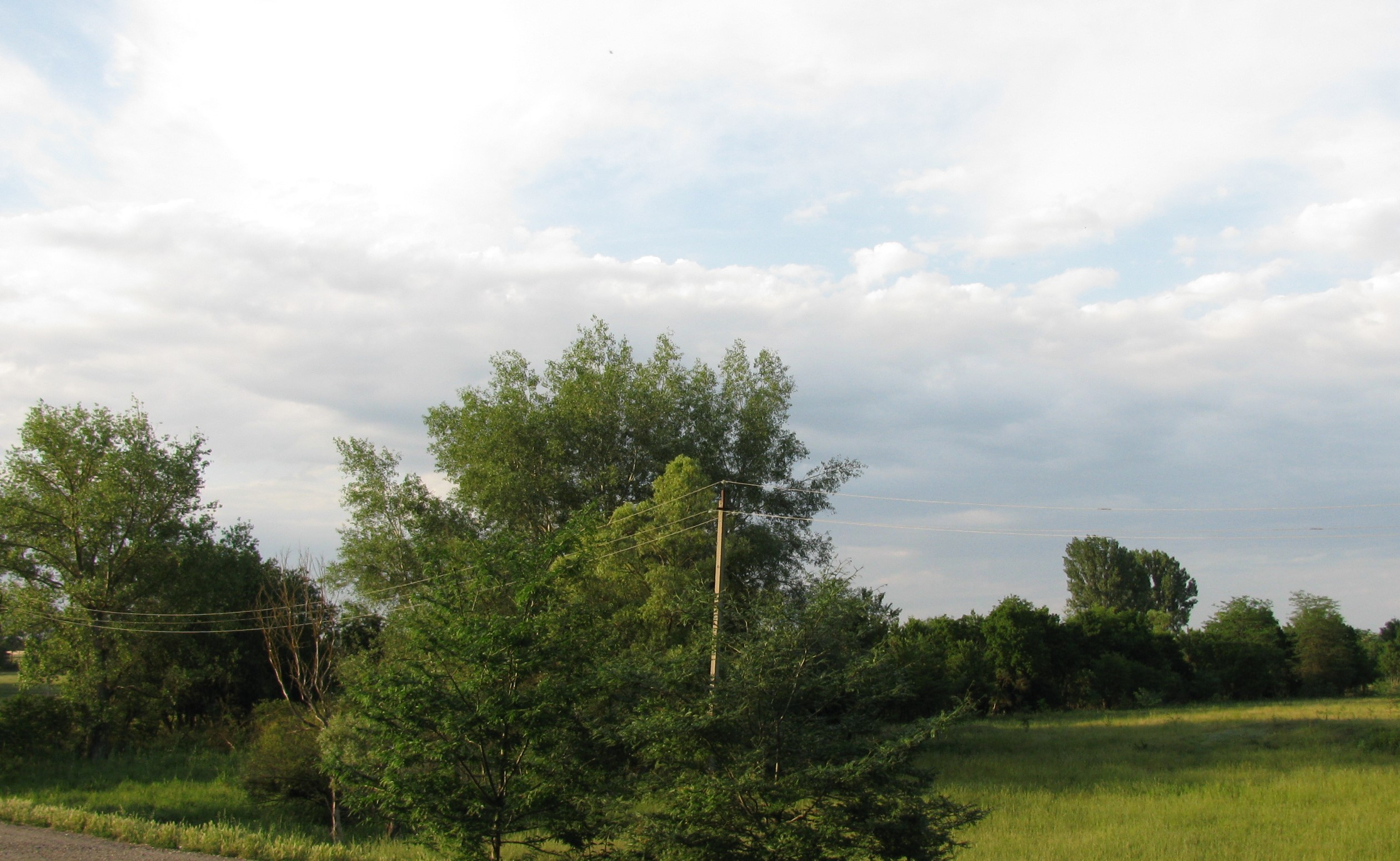 Новоселицкий заказник: Новоселицкий район, Ставропольский край This image is related to the protected area of Russia number 2610107